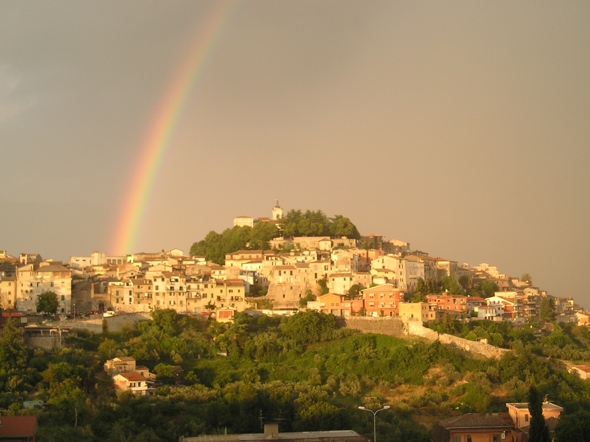 Arcobaleno su Alatri